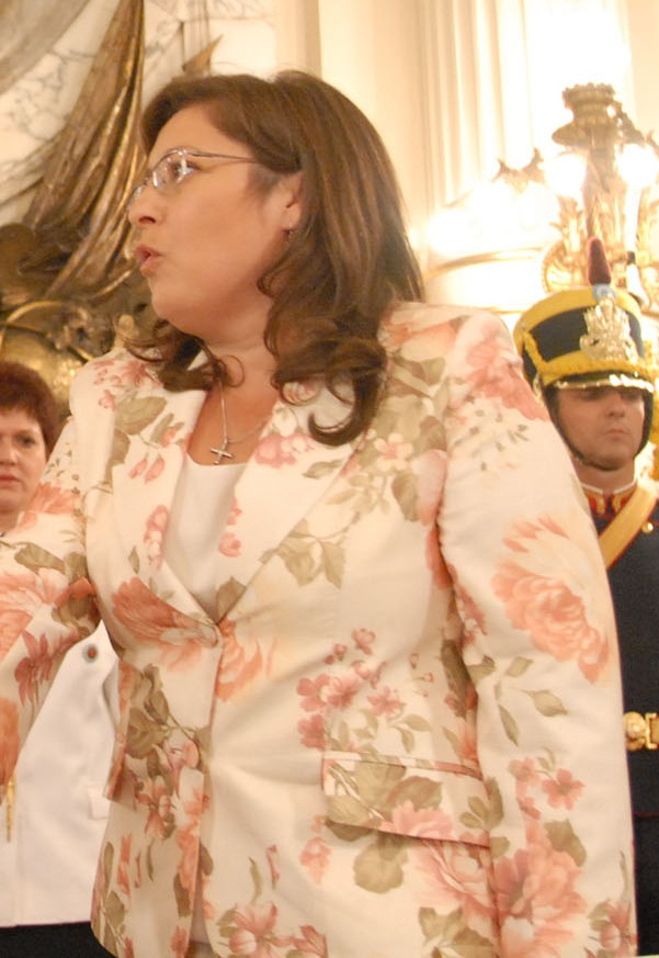 La presidenta Cristina Fernández toma juramento a la ministra de Salud Graciela Ocaña.